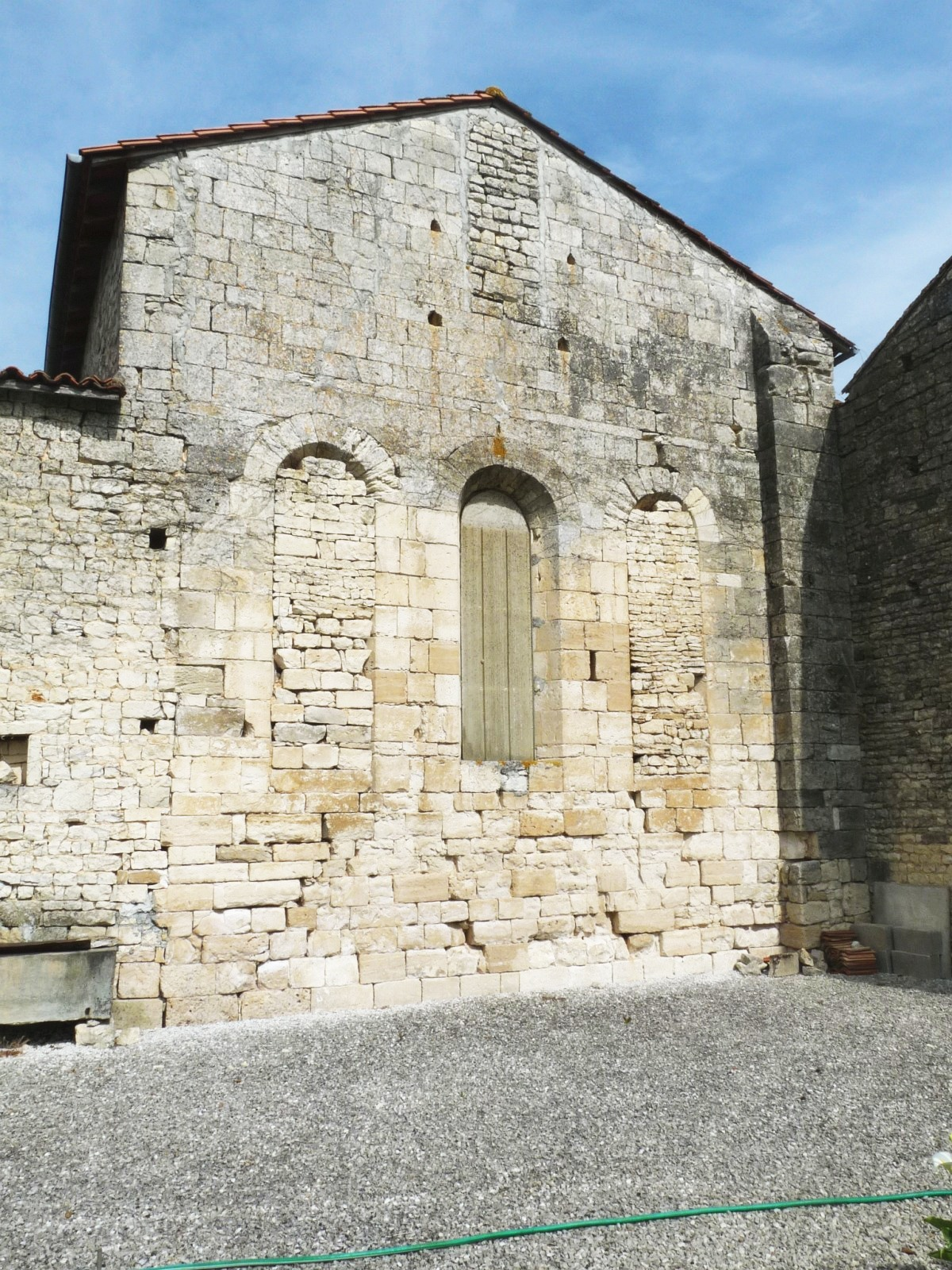 Ancienne chapelle de la commanderie du Fouilloux, La Chapelle, Charente, France